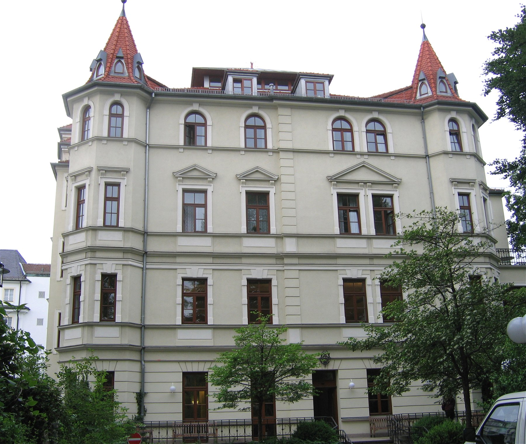 Augenklinik Herzog Carl Theodor in München